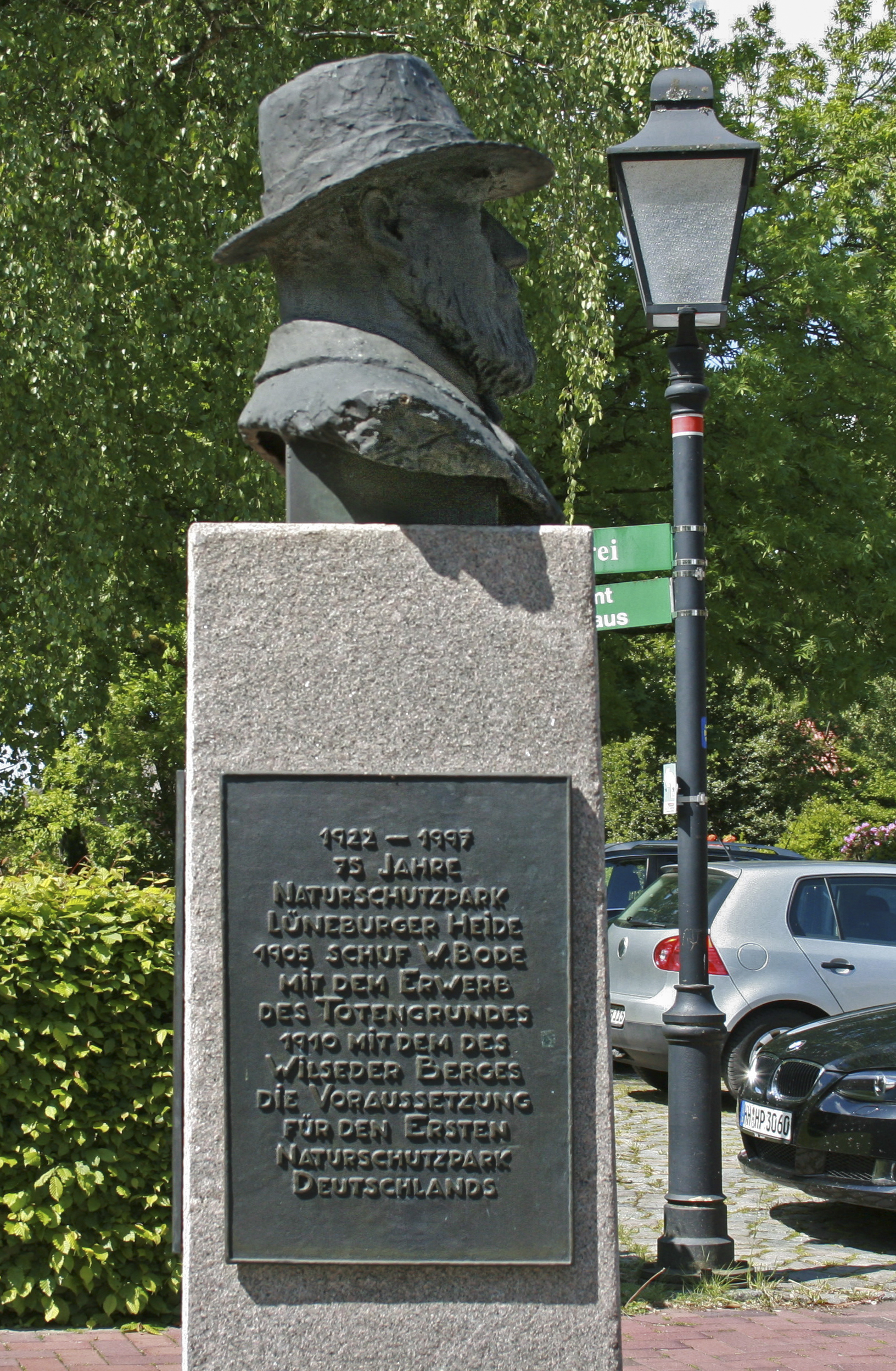 Denkmal für den „Heidepastor“ Wilhelm Bode (1860-1927) in Egestorf